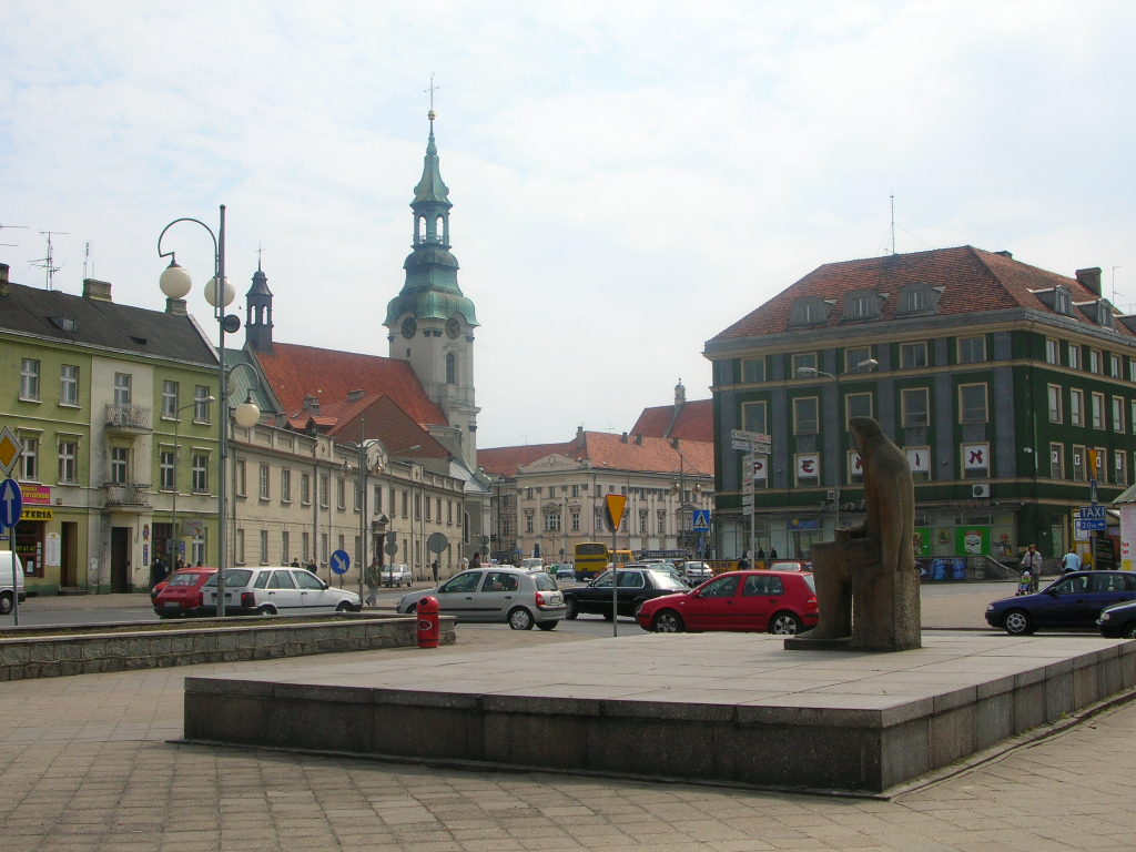 Plac Kilińskiego w Kaliszu. Autor : Bartek Wawraszko (Bast)